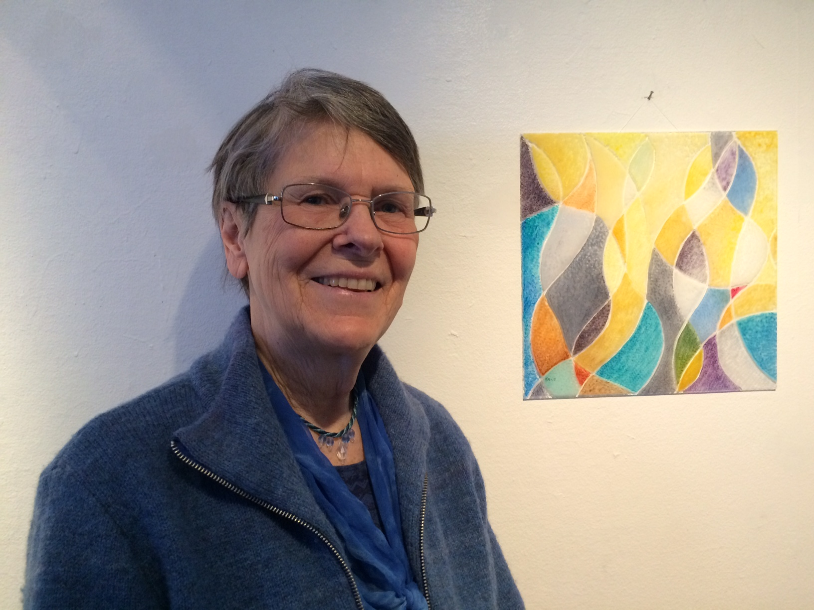 Karin Neuschütz mars 2018 konstutställningen Gult i Järna Foto av Evelin Tamm